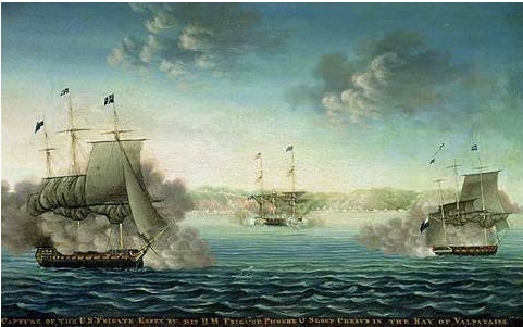 batalla de Valparaiso, 28 de marzo de 1814, por George Ropes